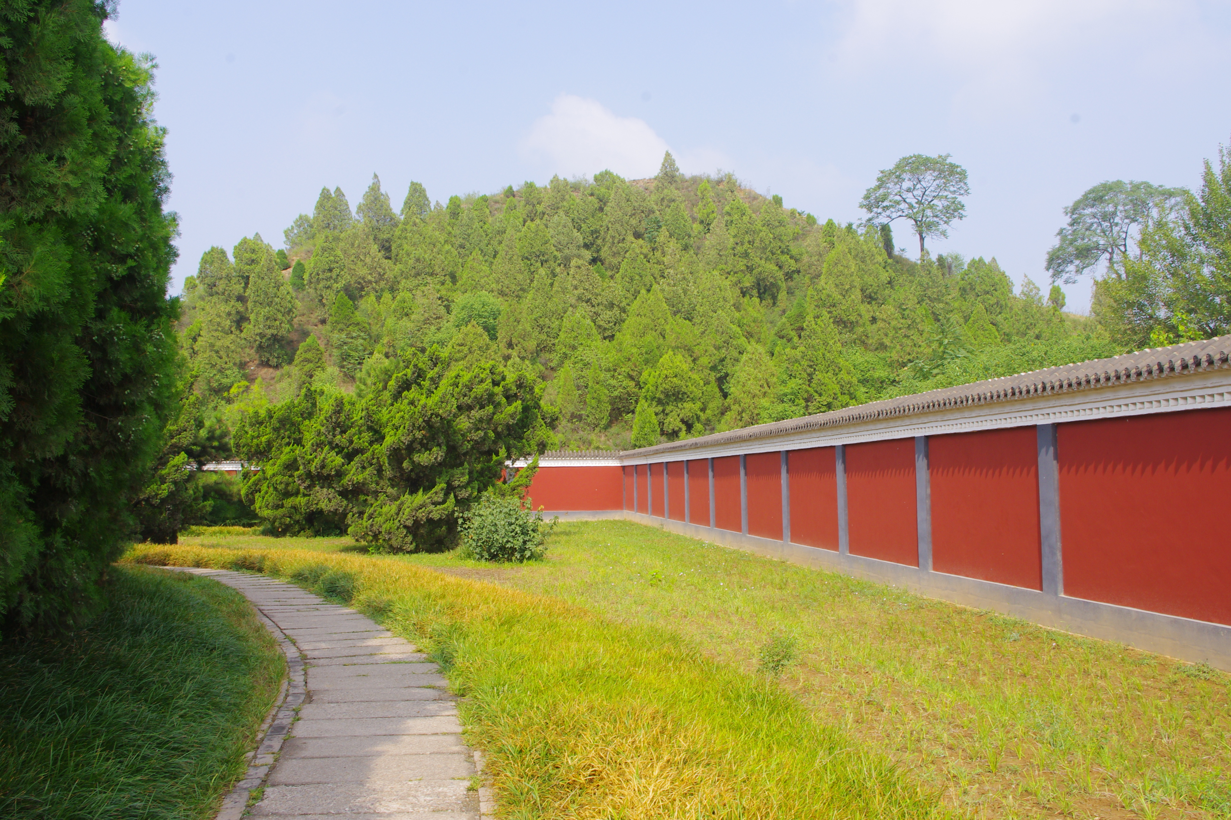 兴平市卫青墓